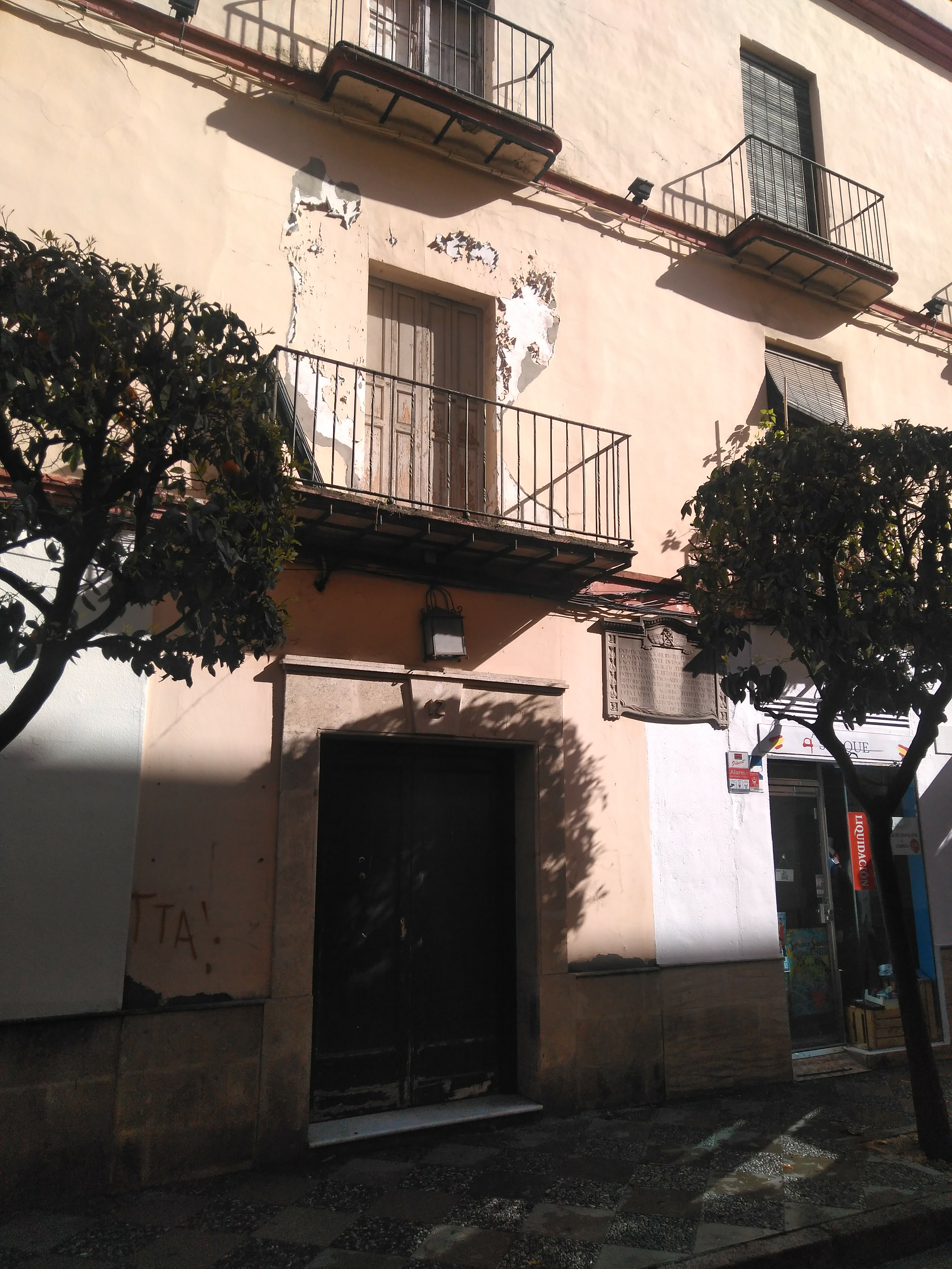 Casa natal de Juan Manuel Durán González (Jerez de la Frontera, España)